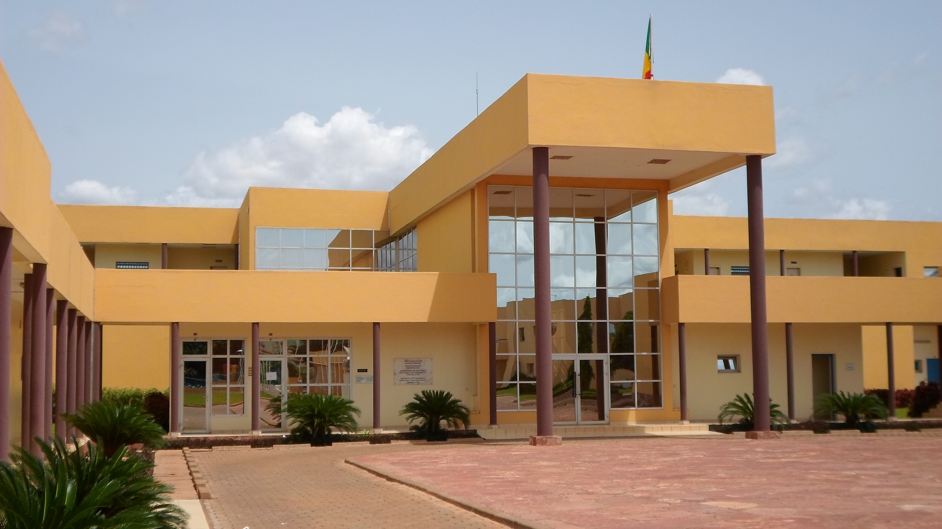 L'architecture de ce bâtiment s'inspire de l'Hôtel d Commandement des Ecoles de Coëtquidan (France) où sont formés les officiers de l'armée de Terre française.